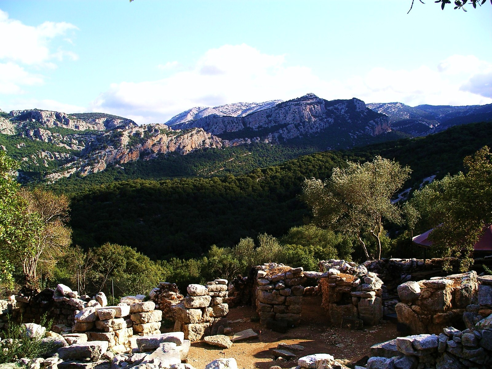 Supramonte di Oliena: villaggio nuragico di Sedda Sos Carros